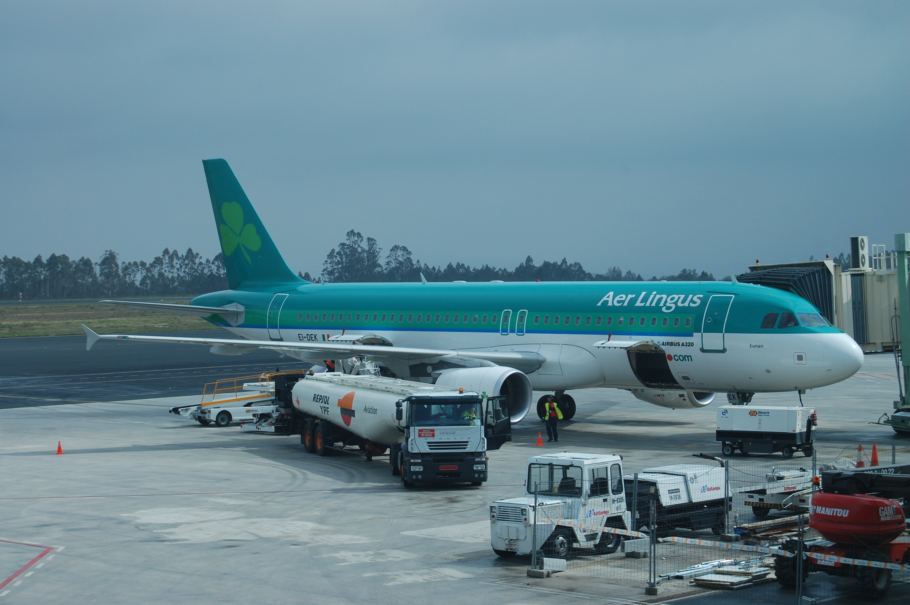 Um avião da empresa irlandesa Aer Lingus no Aeroporto de Santiago de Compostela, Galiza, Espanha.